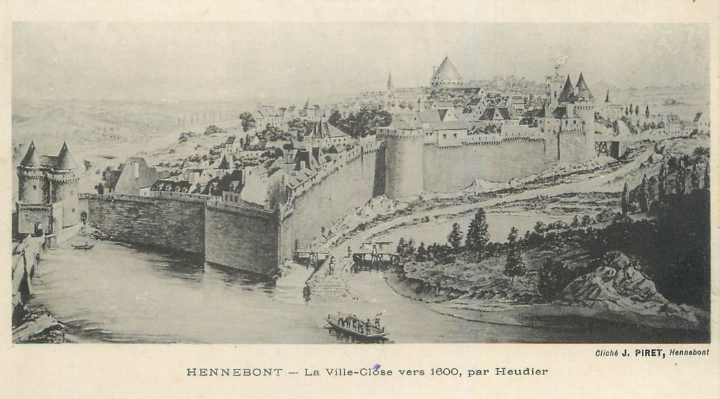 La ville close d'Hennebont vers 1600 par Heudier ( carte postale ancienne, cliché de J. Piret )